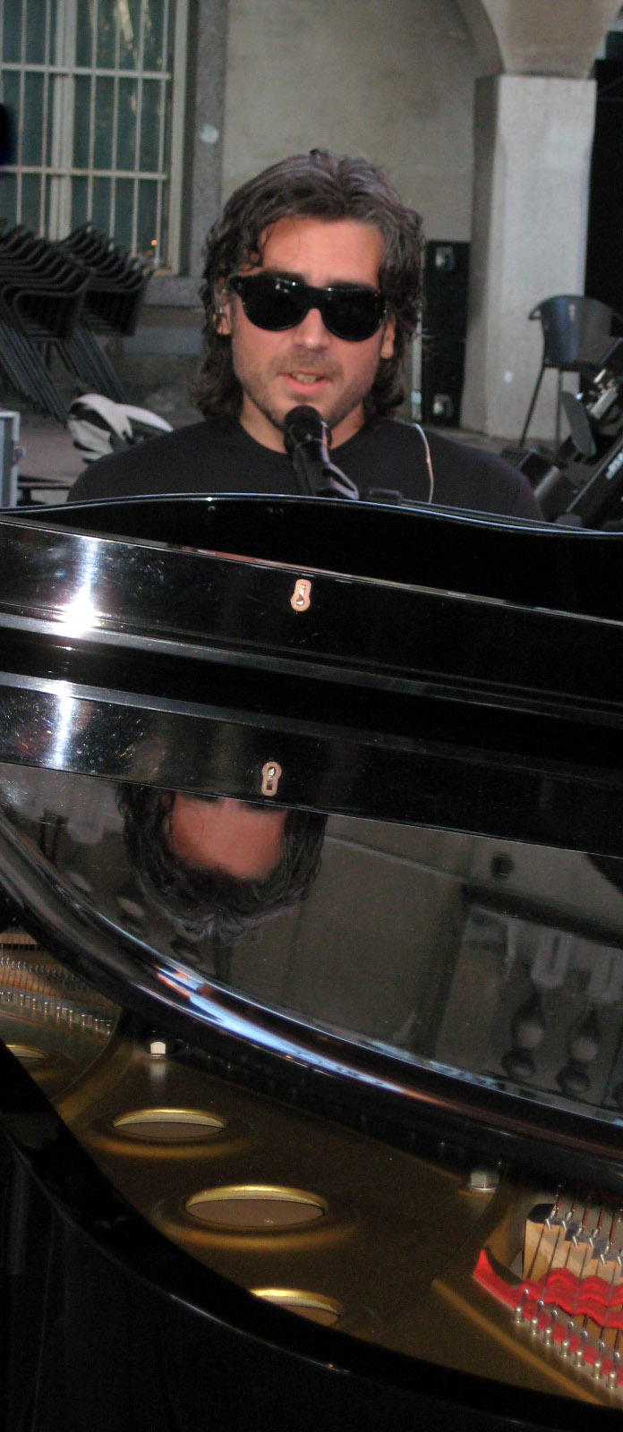 Jan Plestenjak, slovenian pop singer and guitarist